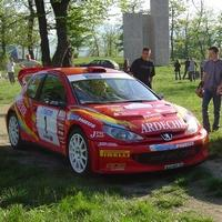 Photo de la 206 WRC de Jean-Marie Cuoq prise lors du Rallye de la Ville d'Annonay 2005.